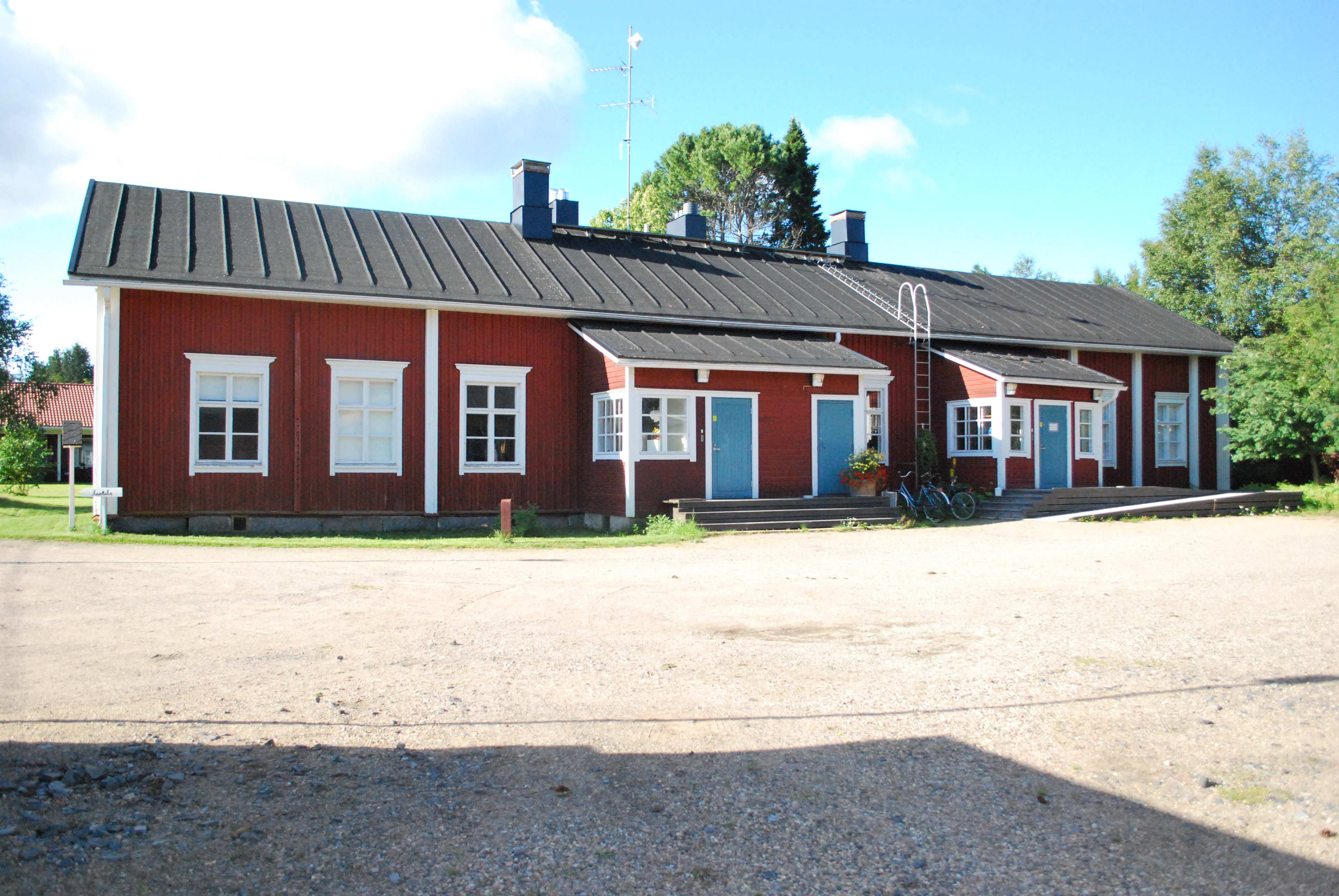 Taidekeskus KulttuuriKauppilan tukikohta on Iissä.